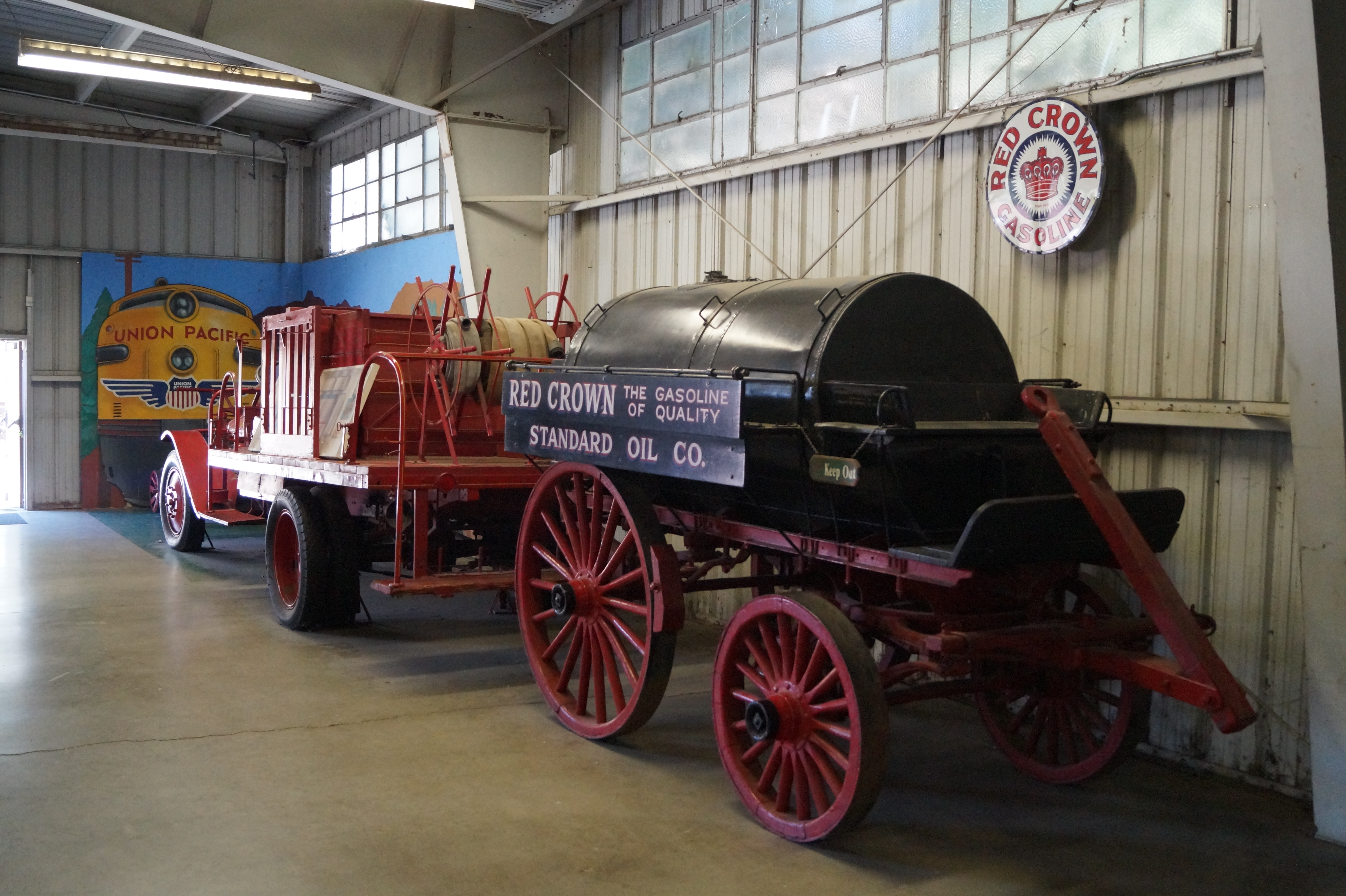 Travel Town Museum is a transport museum dedicated in the northwest corner of Los Angeles, California's Griffith Park. The history of railroad transportation in the western United States from 1880 to the 1930s is the primary focus of the museum's collection, with an emphasis on railroading in Southern California and the Los Angeles area.